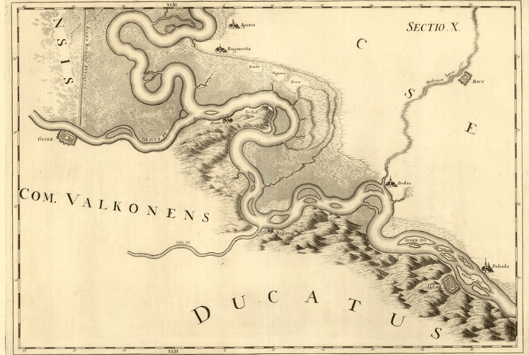 La Hongrie Et Le Danube : En XXXI. Cartes très fidelément gravées d'après les Desseins originaux & les Plans levez sur les lieux par l'Auteur même. Ouvrage où l'on voit la Hongrie, par rapport à ses Riviers, à ses Antiquez Romaines, & à ses Mines; & les Sources & le Cours du Danube, &c. Avec une Préface sur l'excellence & et l'usage de ces Cartes]. Par Mr. Le Comte De Marsigli] Sectio X., Tab. XII., [Vrangos - Palancka